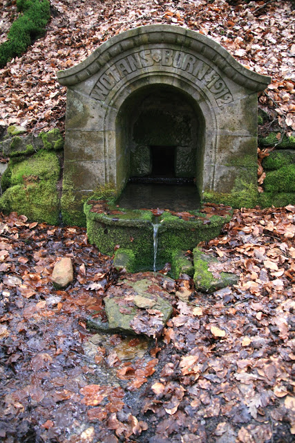 Wotansborn im Steigerwald